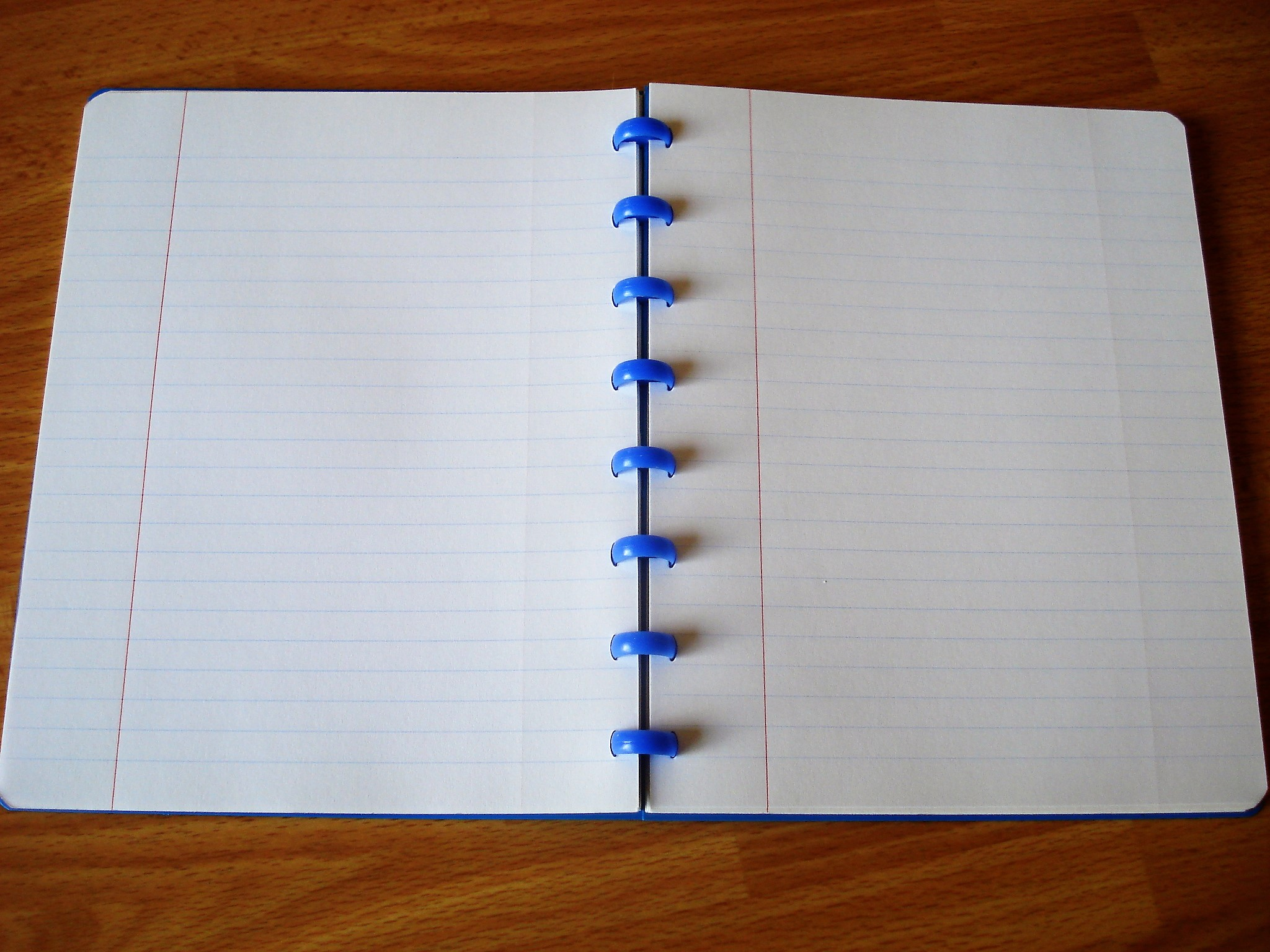 carnet avec anneaux